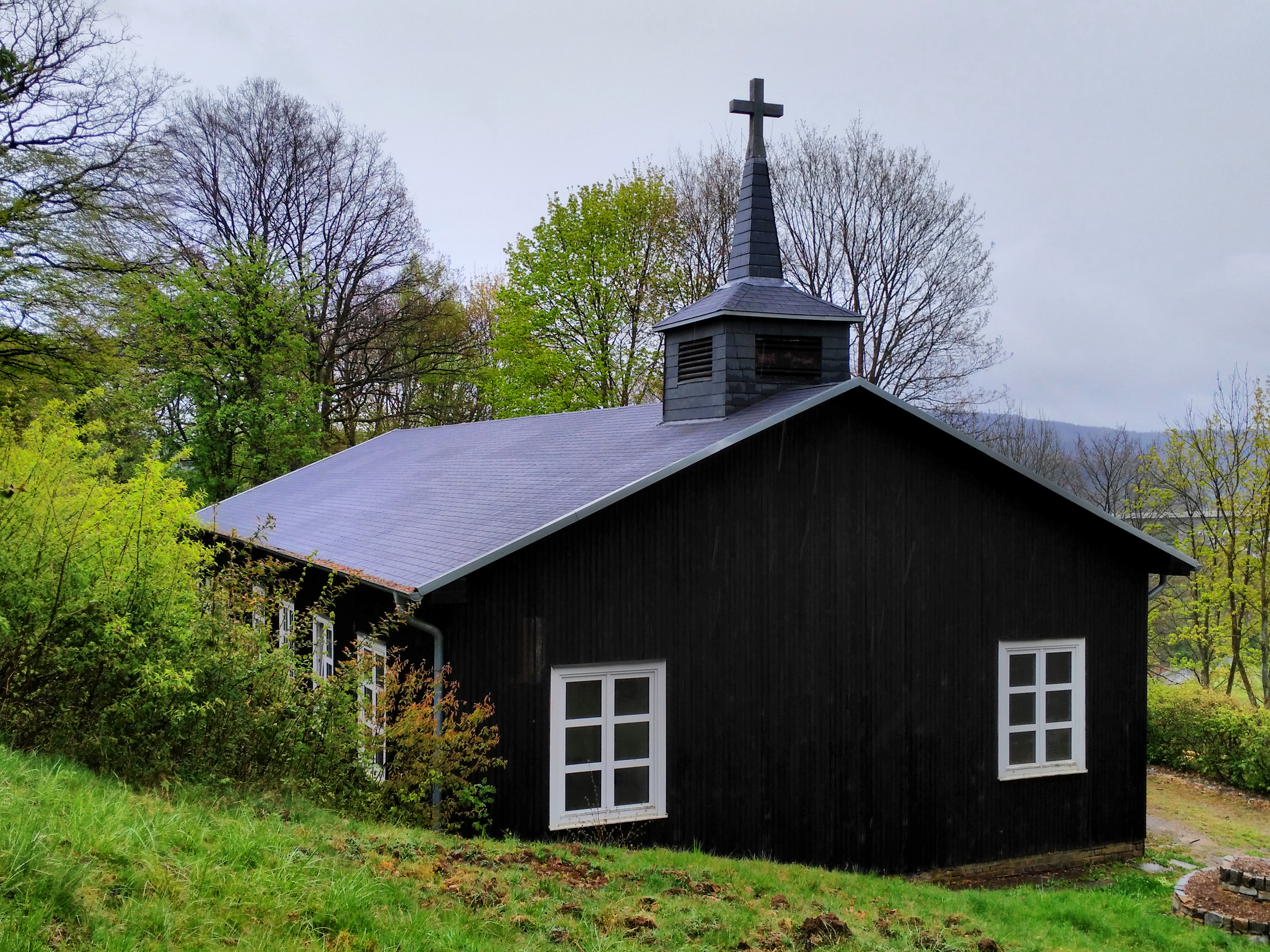 Das Foto zeigt die Friedenskirche, eine Holzkirche in Siegen-Achenbach, am 1. Mai 2017.